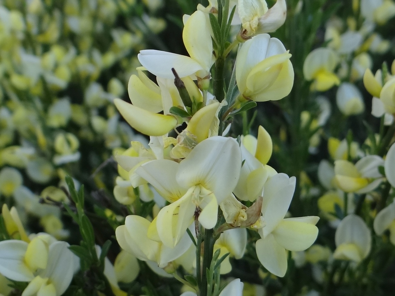 Cytisus praecox 'Albus' (Poland, ogród biblijny w Proszowicach)